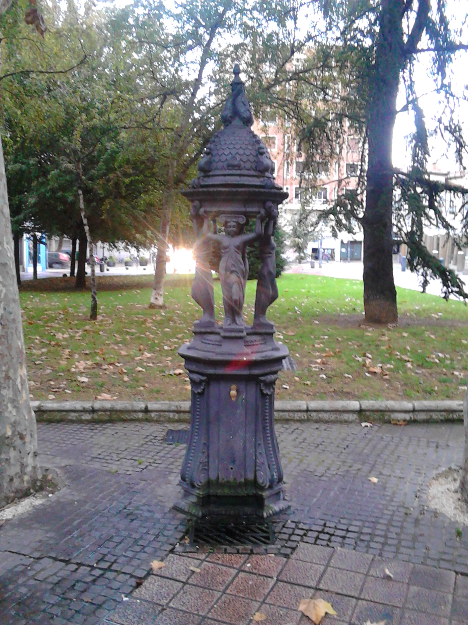 Fonte de Wallace no centro de Vitoria